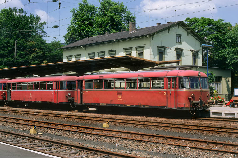 Hunsrückbahn vor altem Bopparder Bahnhofsgebäude